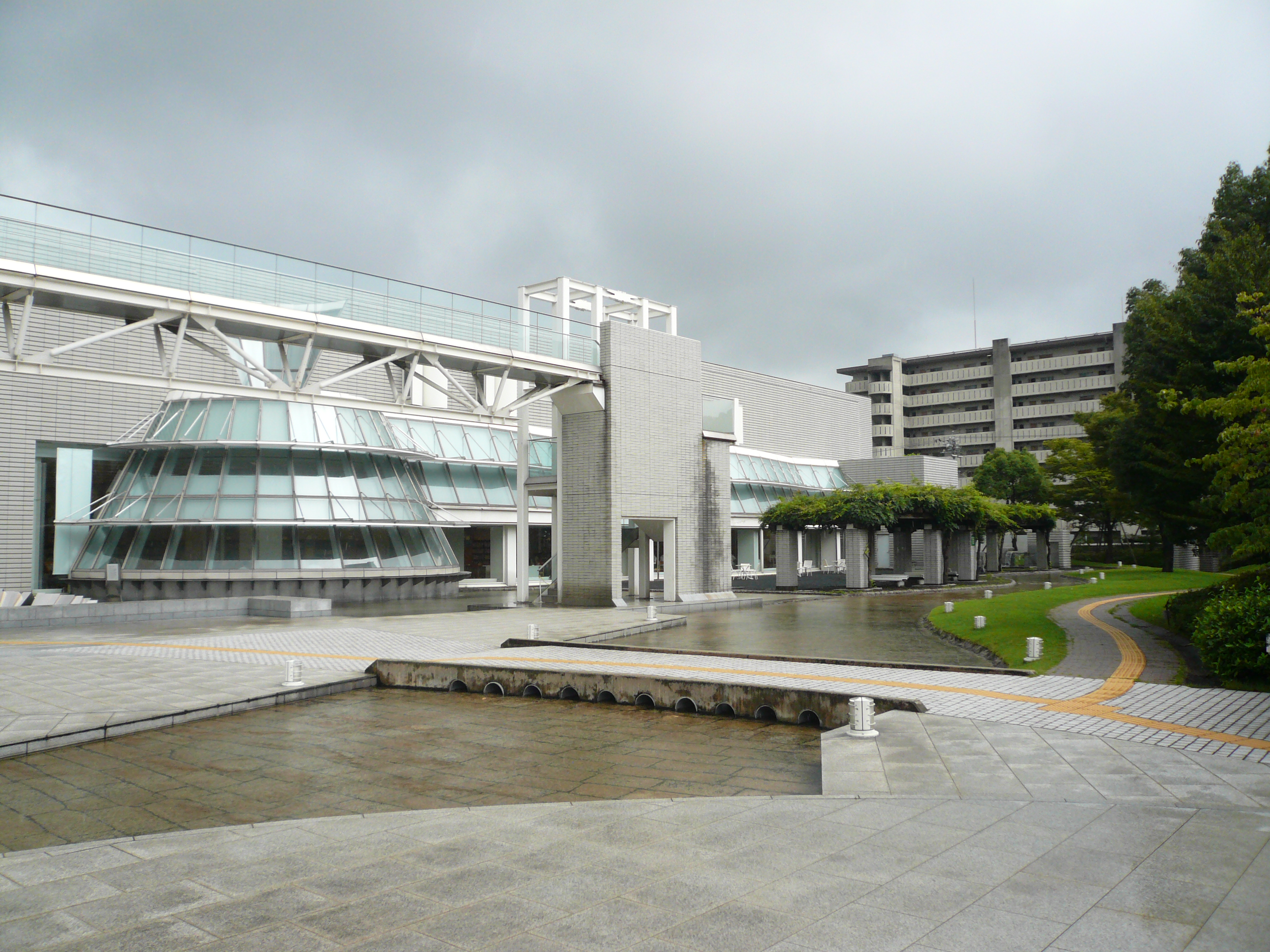 Gifu Prefectural Library（岐阜県図書館）,Gifu,Gifu,Japan（岐阜県岐阜市）で撮影。庭園。